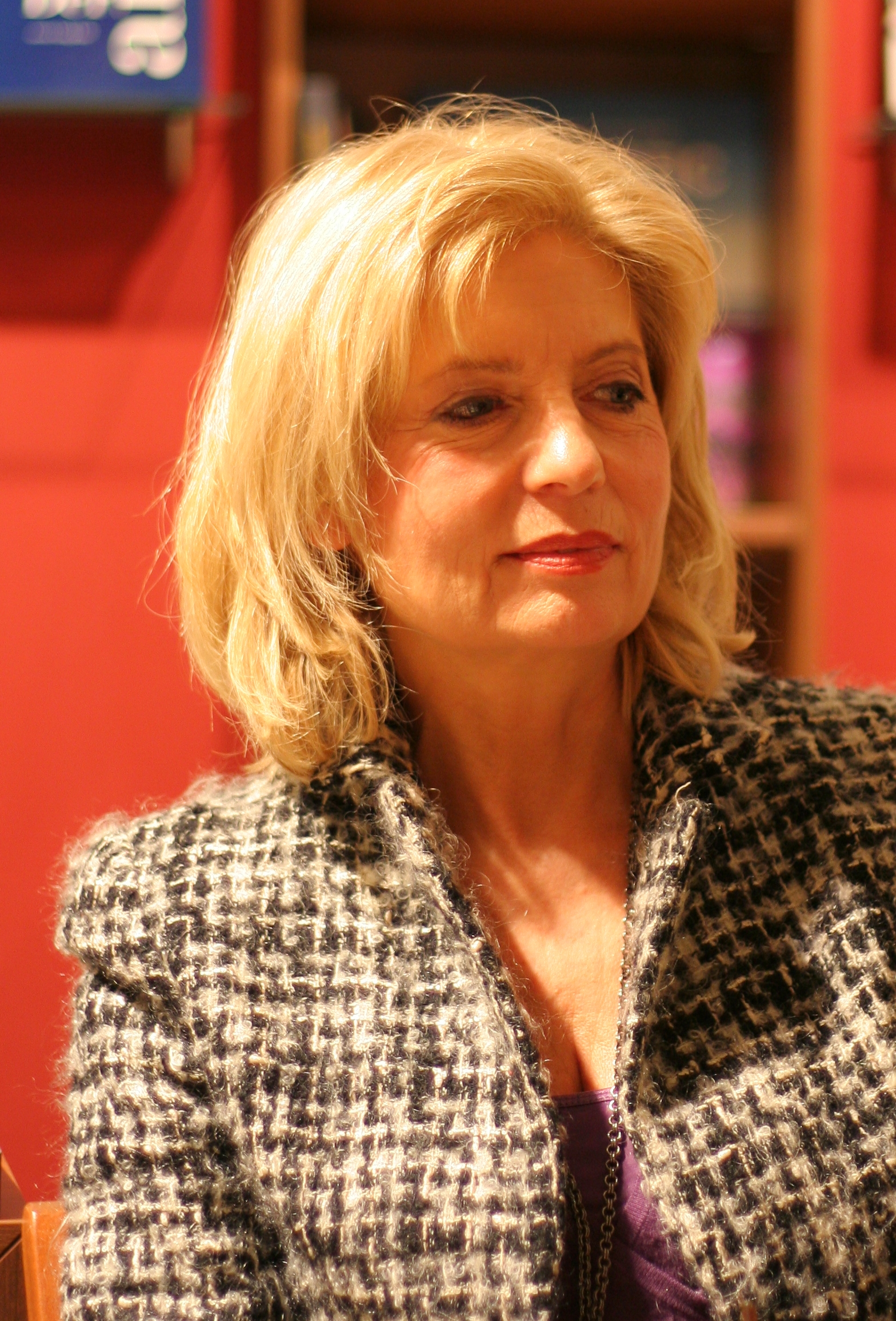 TV-Schauspielerin Sabine Postel bei einer Buchpräsentation